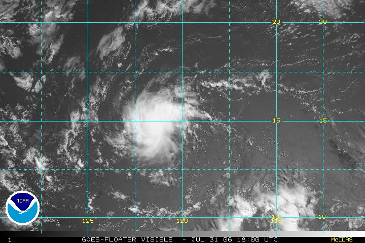 TD7-E